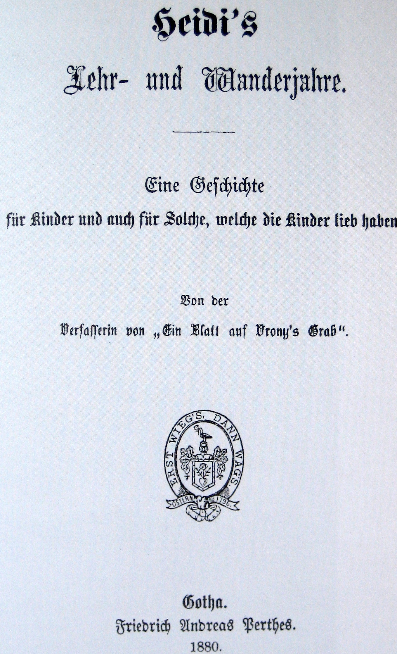 Titelblatt der Erstausgabe von Johanna Spyris Heidi